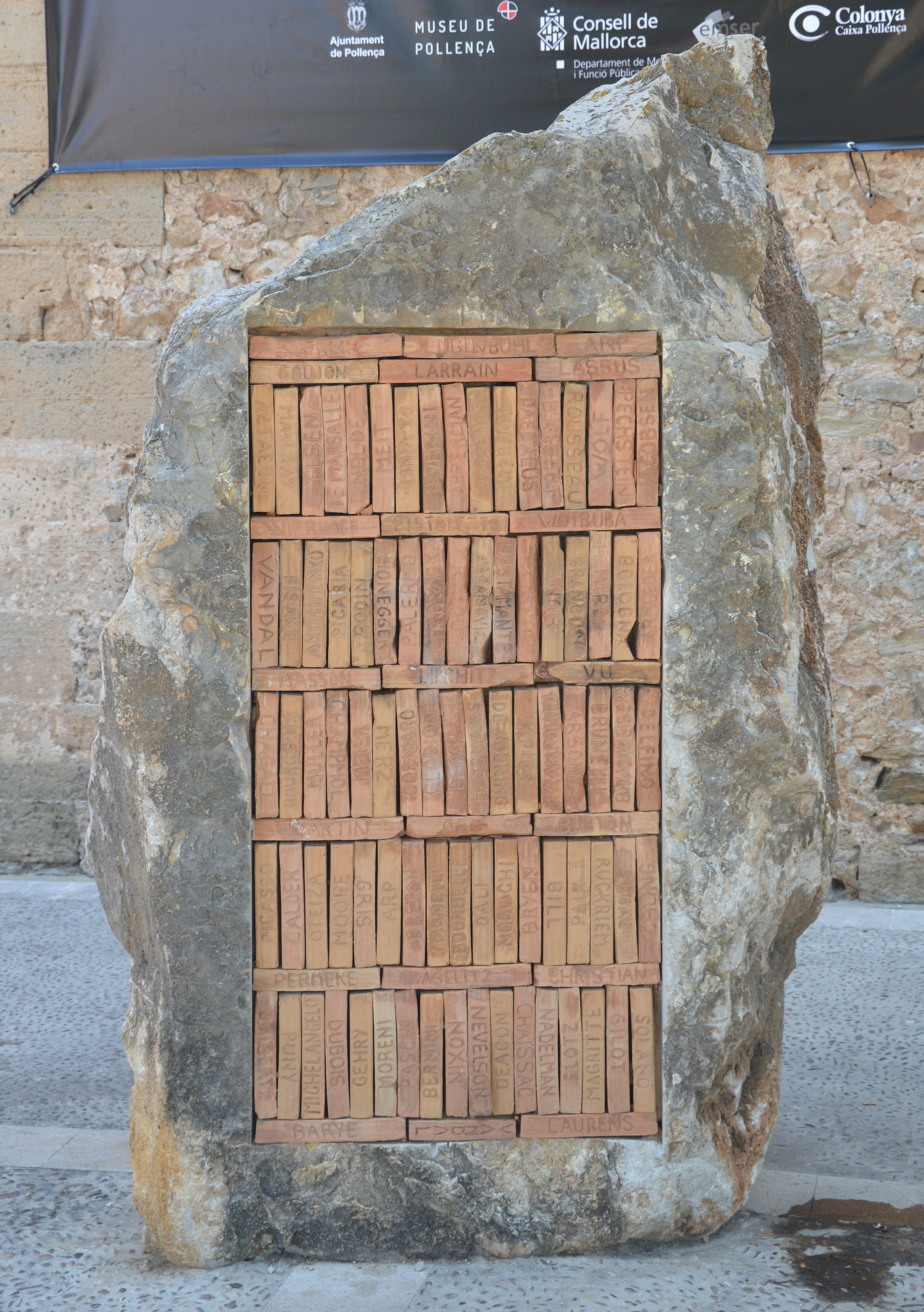 Biblioteca mallorquina von Ben Jakober in Pollenca